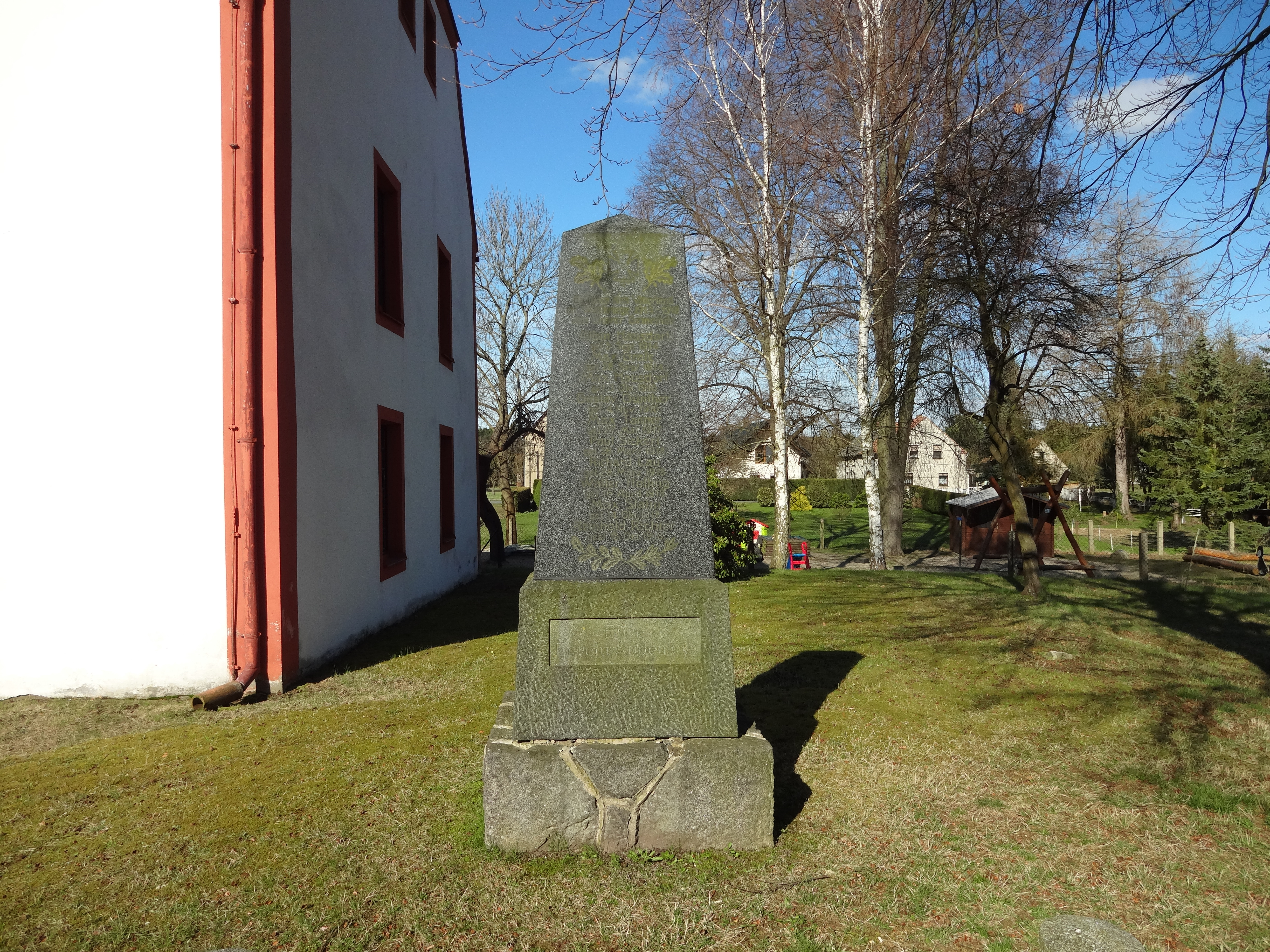 Denkmalgeschütztes Kriegerdenkmal für die Gefallenen des Ersten Weltkrieges in Cosel; Gemeinde Schwepnitz